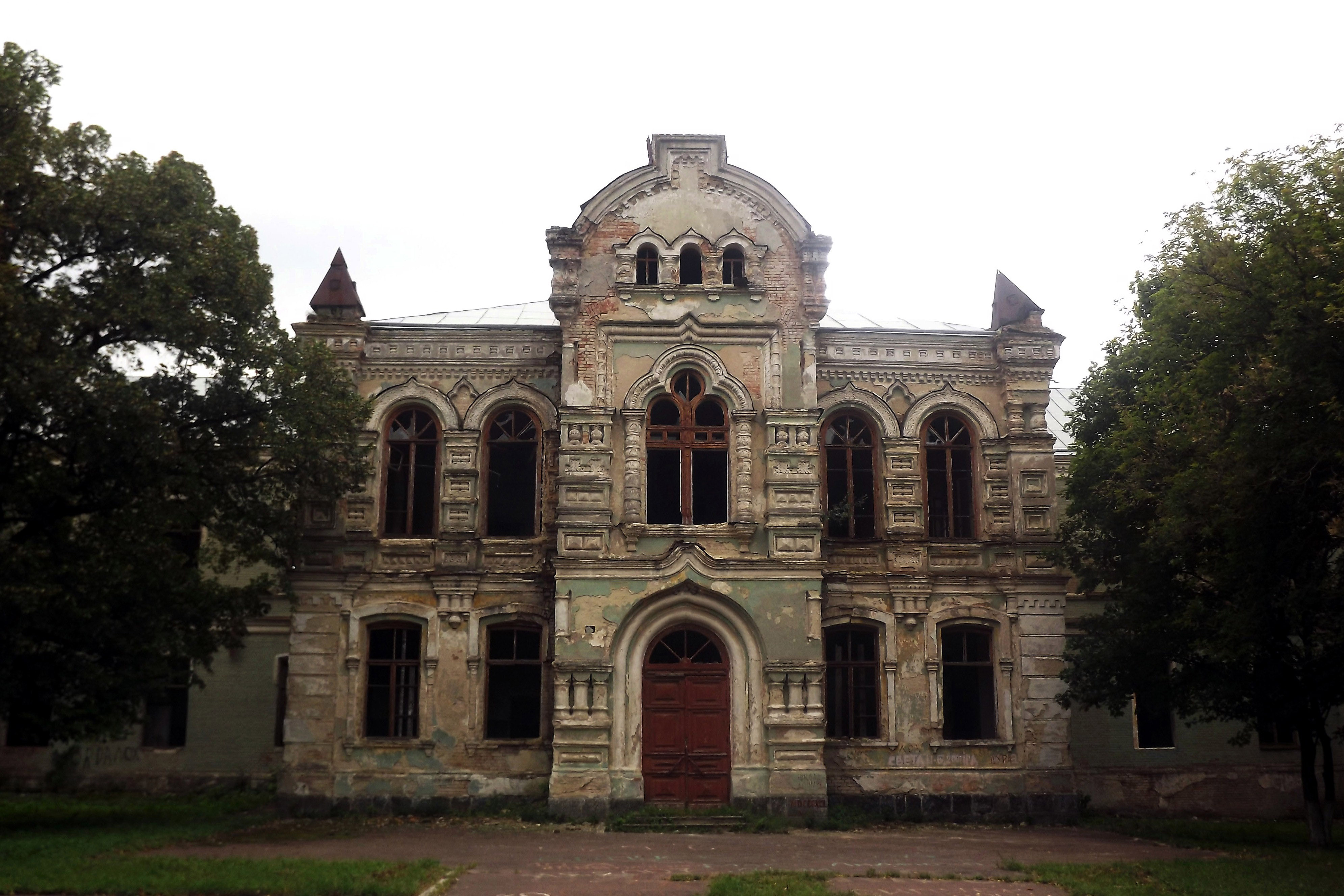 Златопільська гімназія. Північний фасад (Новомиргород, Кіровоградська область)